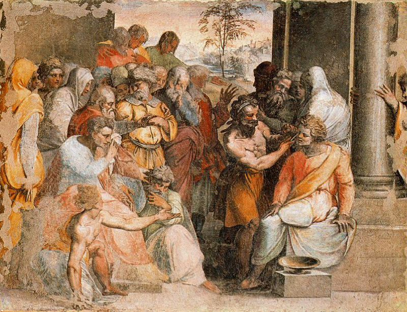 Justicia de Seleuco, fresco traspasado a lienzo, Galleria degli Uffizi, Florencia